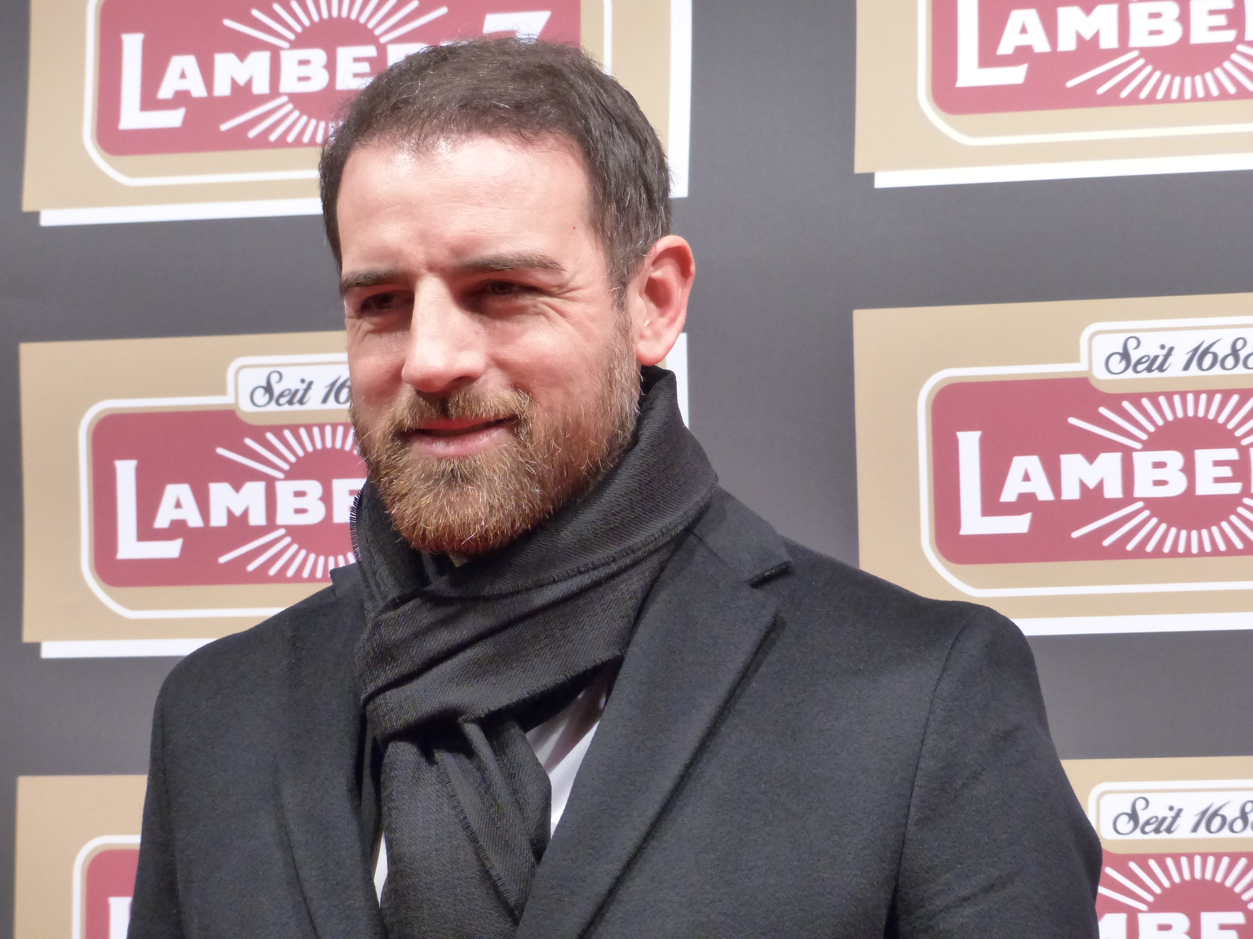 Christoph Metzelder bei der Lambertz Monday Night, im Februar 2016.